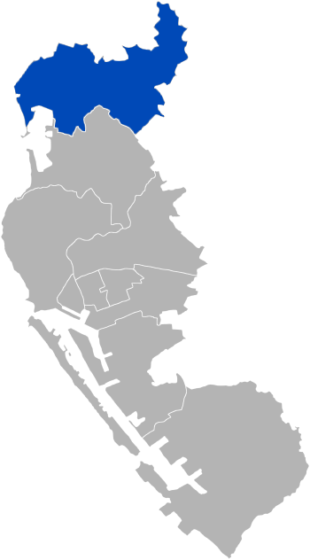 Nanzih District, Kaohsiung City